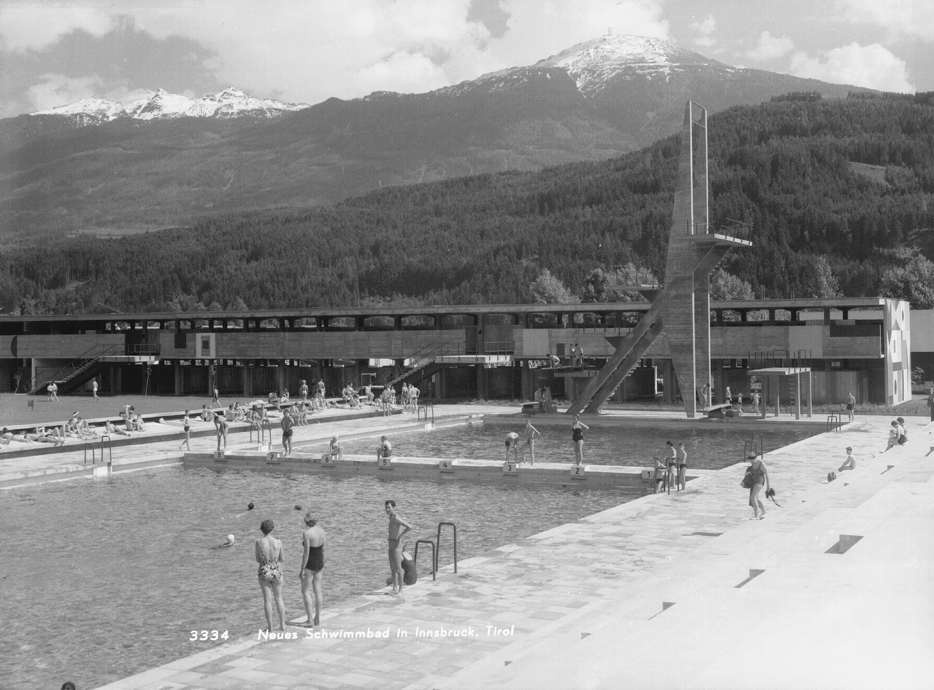 Neues Schwimmbad in Innsbruck / Tirol